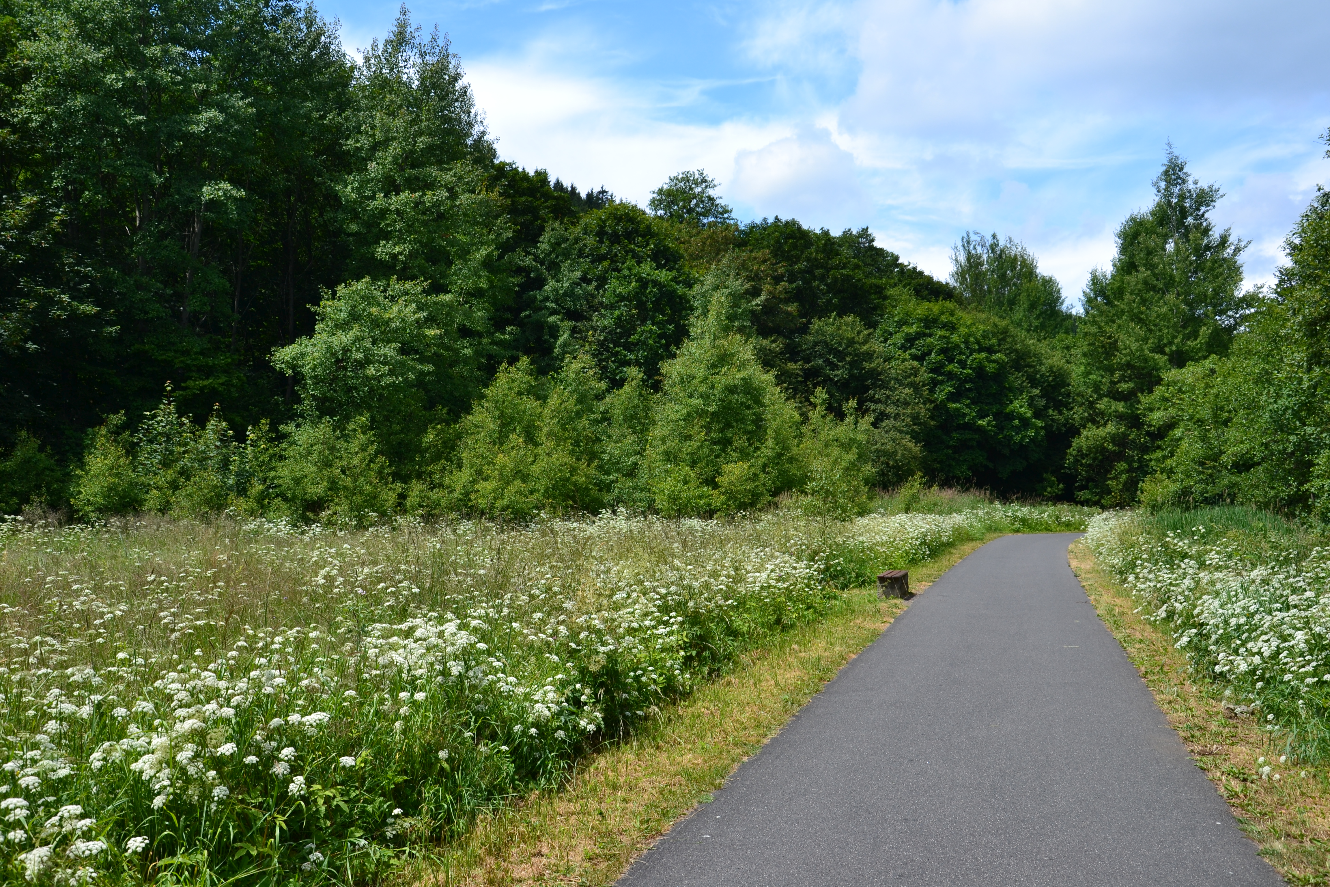 Bezručovo údolí - cyklostezka mezi nepokosenými loukami